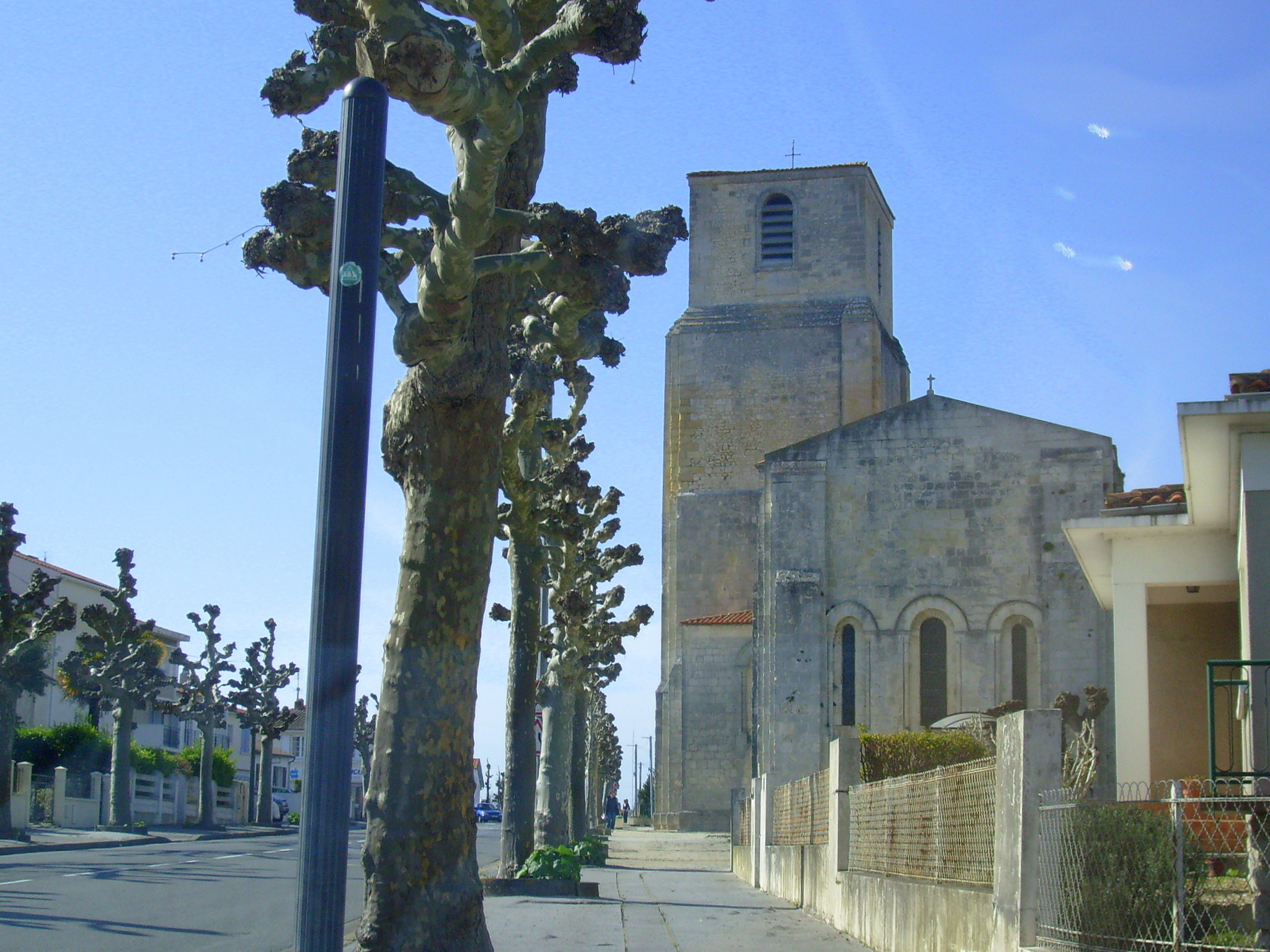 photographie de Cobber17